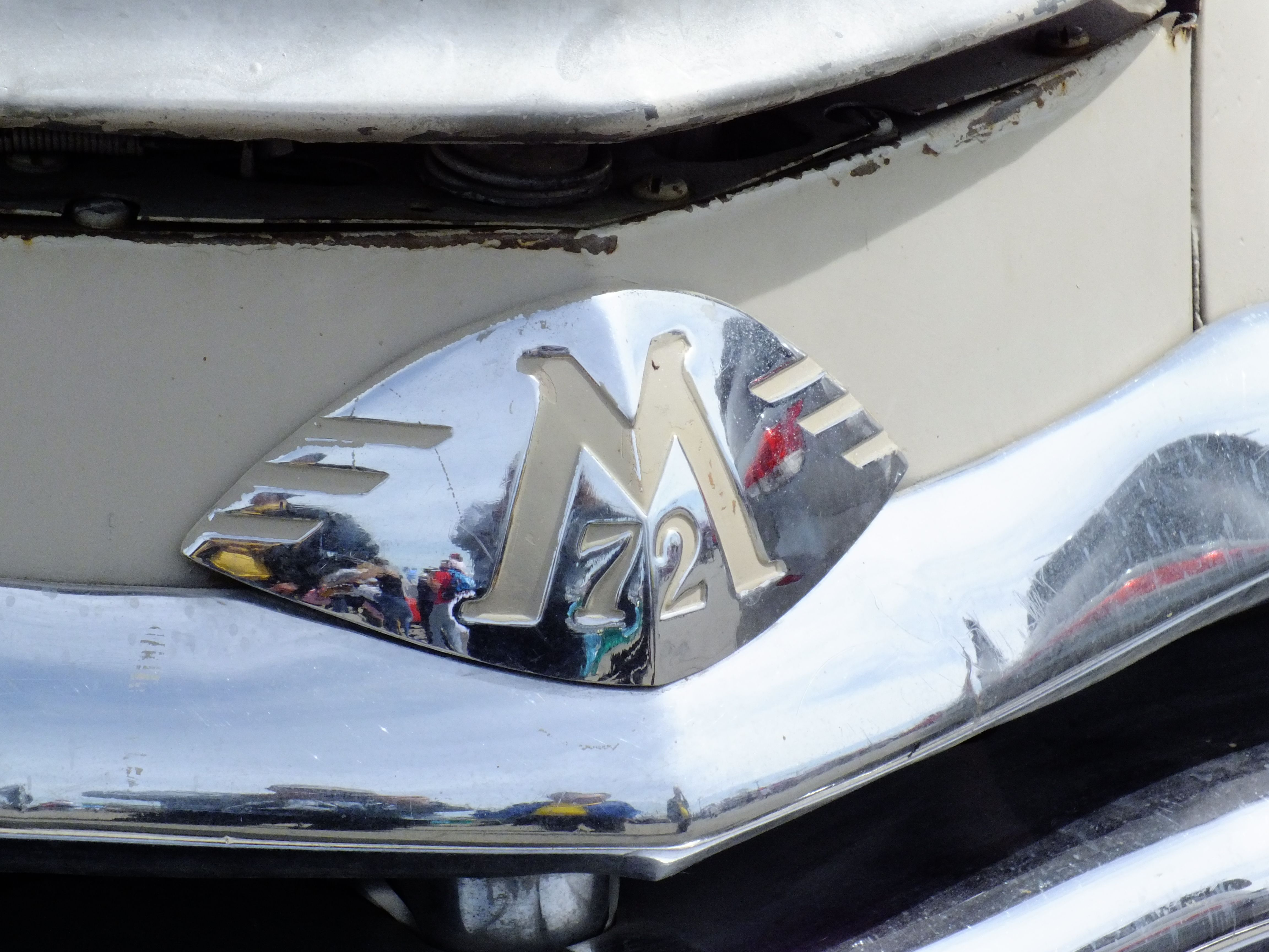 GAZ-M-72